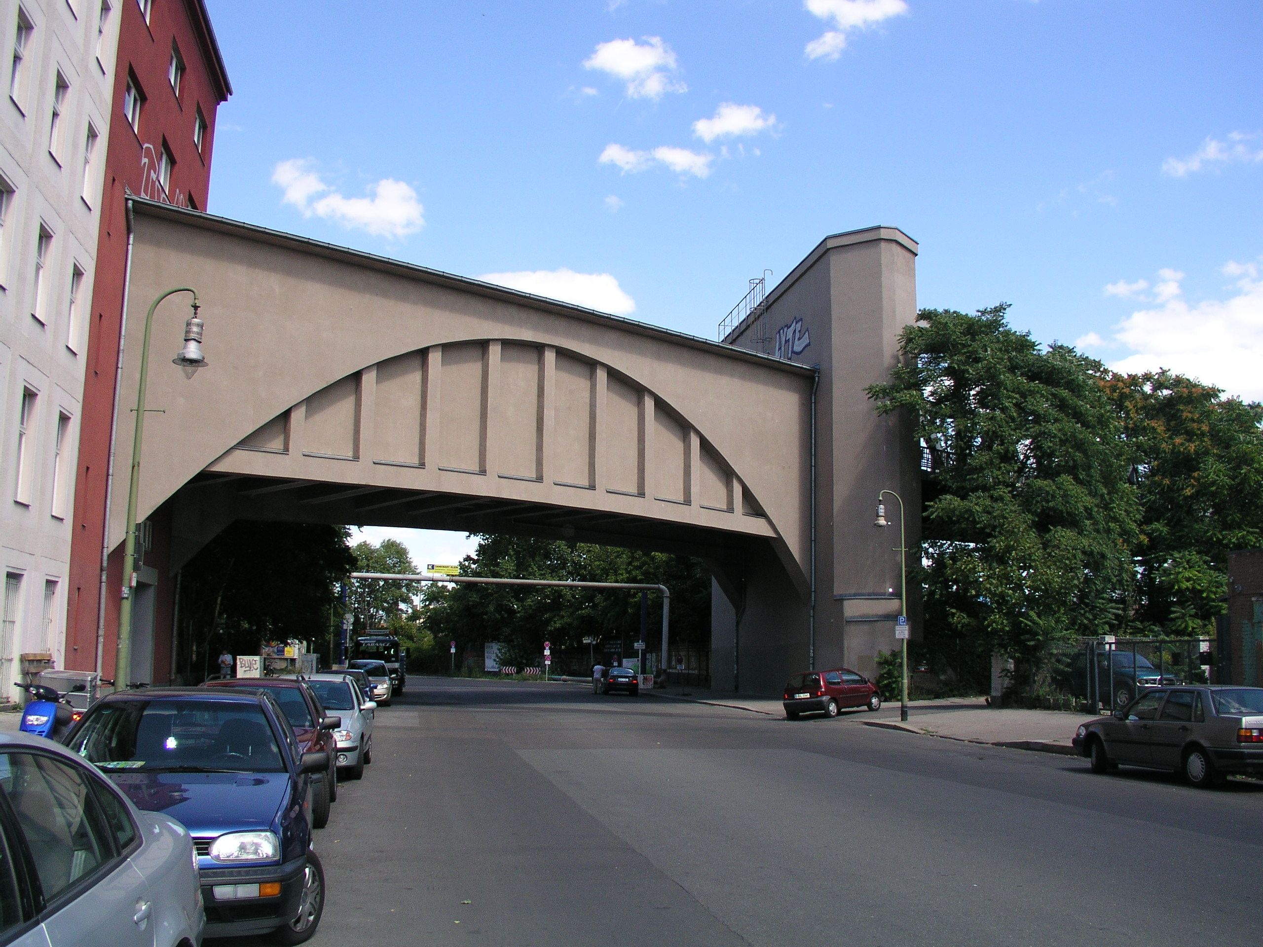 U-Bahn-Überführung in der Dennewitzstraße in Berlin (1)